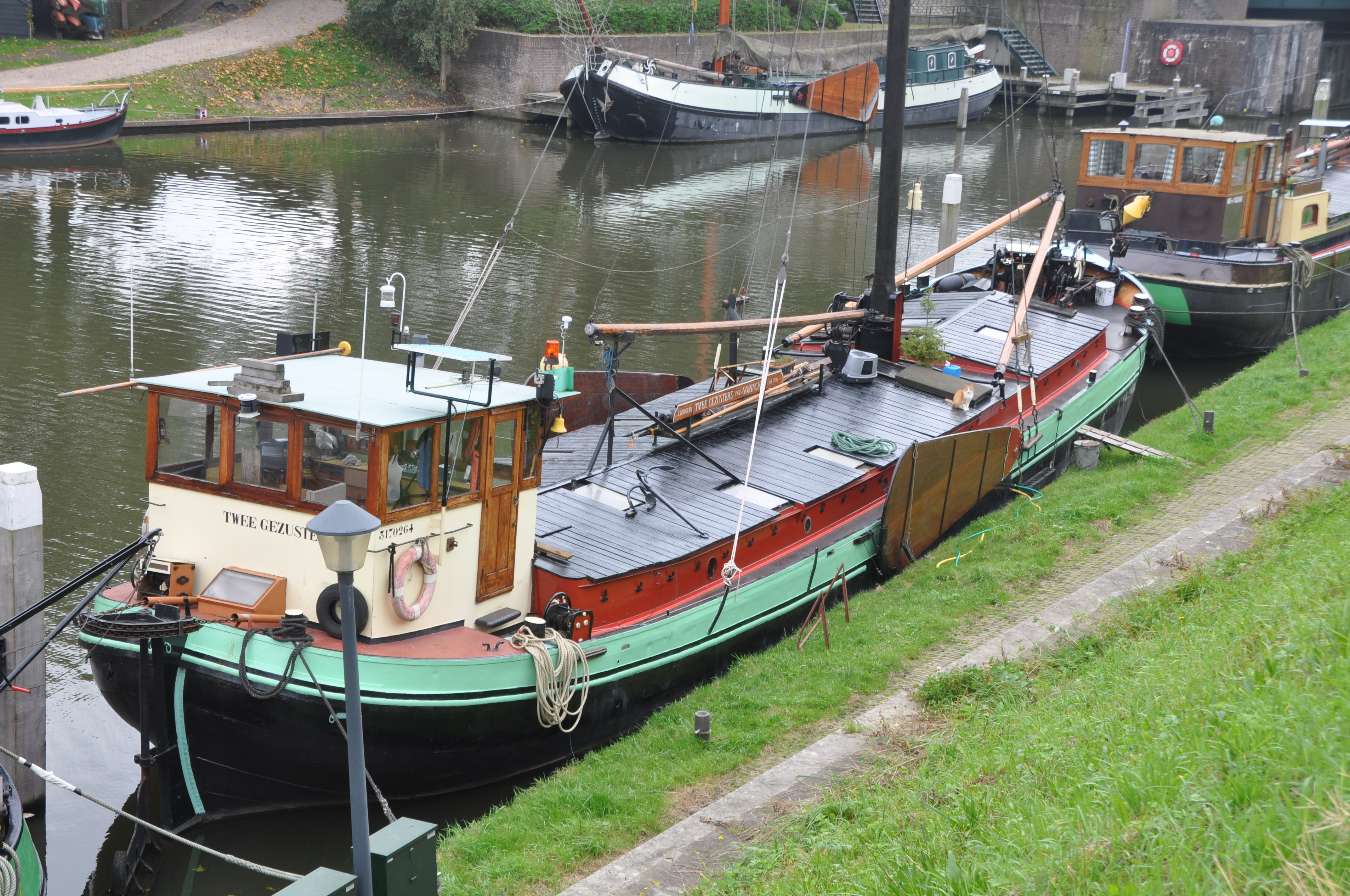 De TWEE GEZUSTERS aan de Ondervloed in Gorinchem.